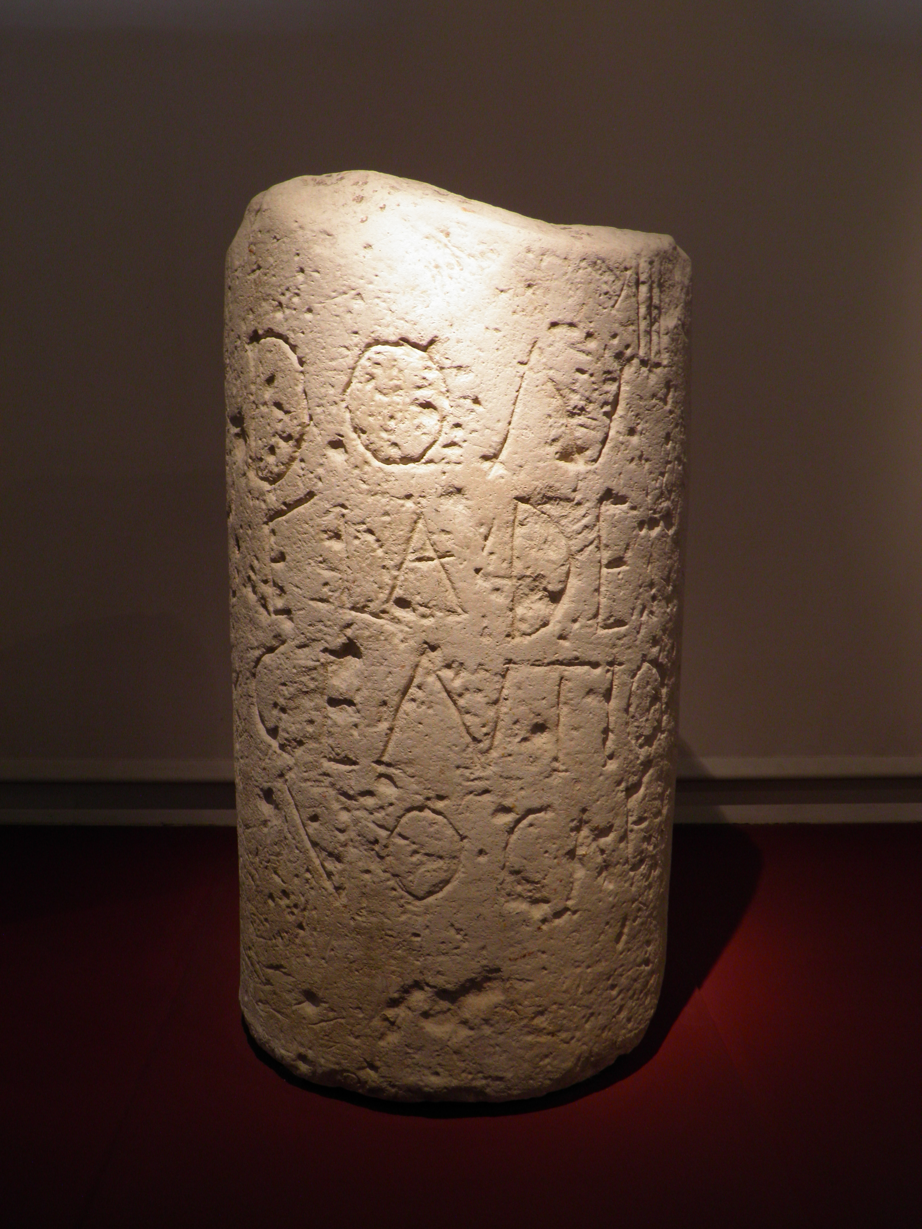 Morceau d'un milliaire de la voie romaine de Toulouse à Narbonne, MSR, Musée Saint-Raymond. Cf. Gerold Walser, CIL XVII-2, 1986, inscr. 305 p. 114 (CIL XVII2, 00305)